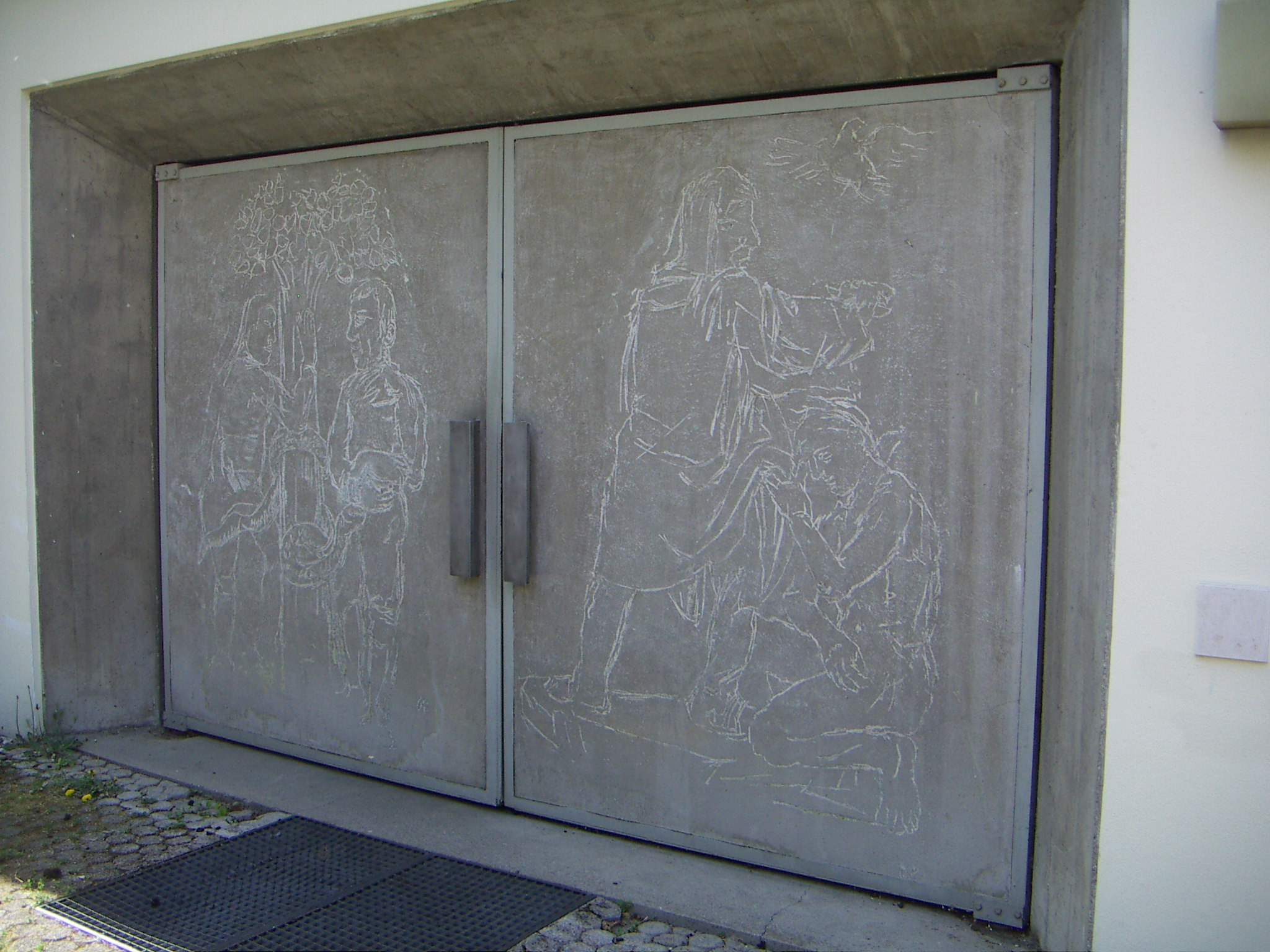 Parscher Pfarrkirche Zum Kostbaren Blut, Eingang hinter dem Altarraum, zwei Zeichnungen nach Vorlagen von Oskar Kokoschka, in den frischen Beton geritzt